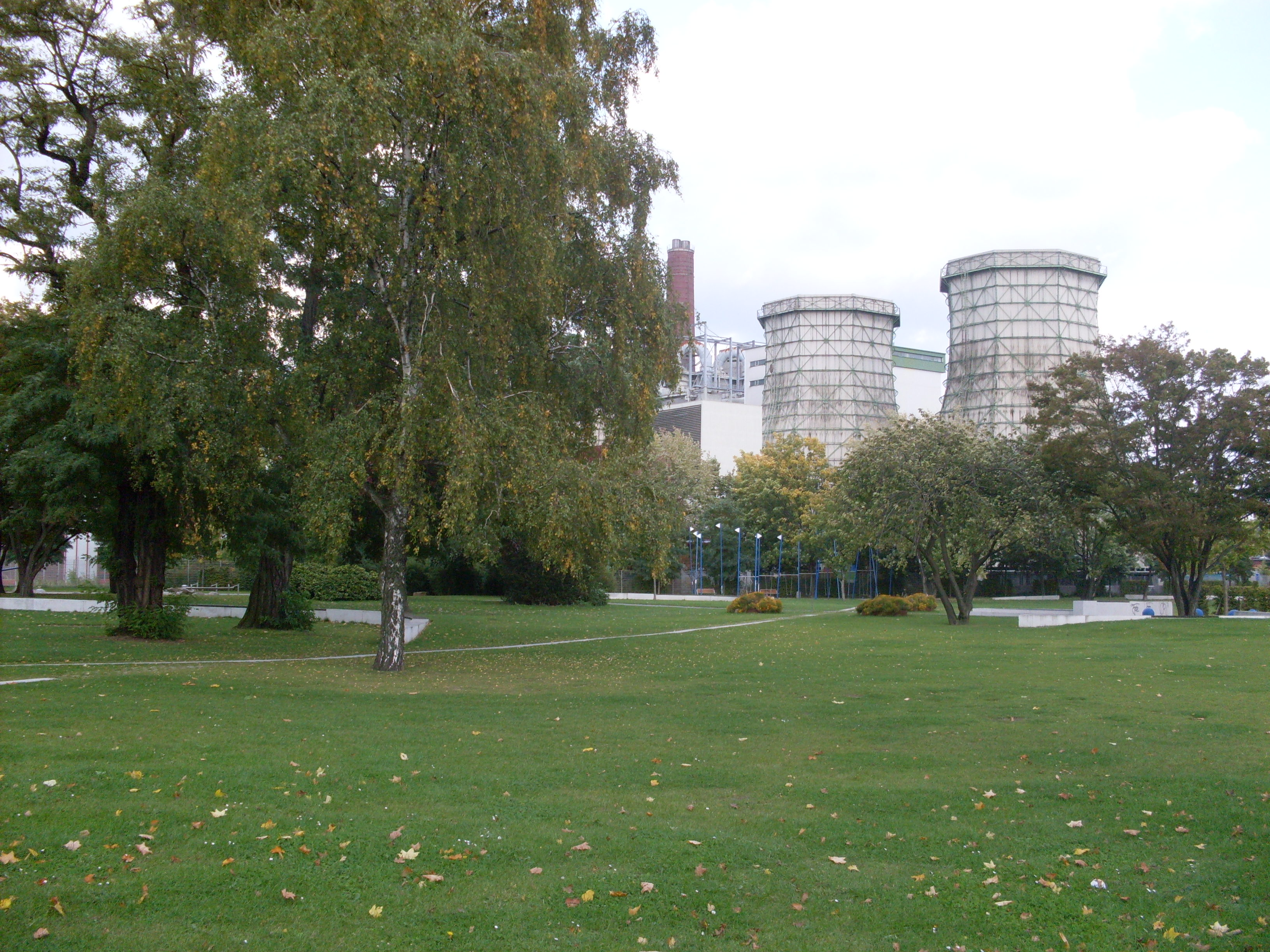 Düsseldorf Flingern-Süd, Stadtwerkepark mit Kraftwerk im Hintergrund